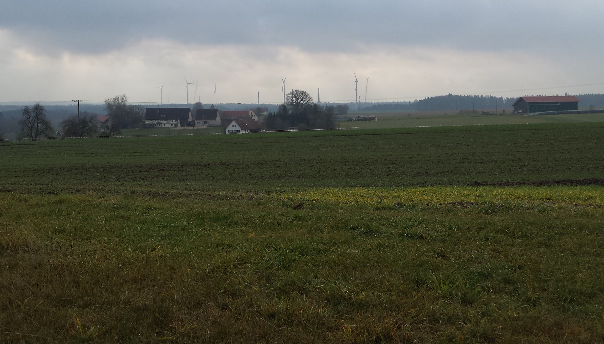 The hamlet of Fichtenhof in the municipality of Fichtenau, Baden-Württemberg, Germany